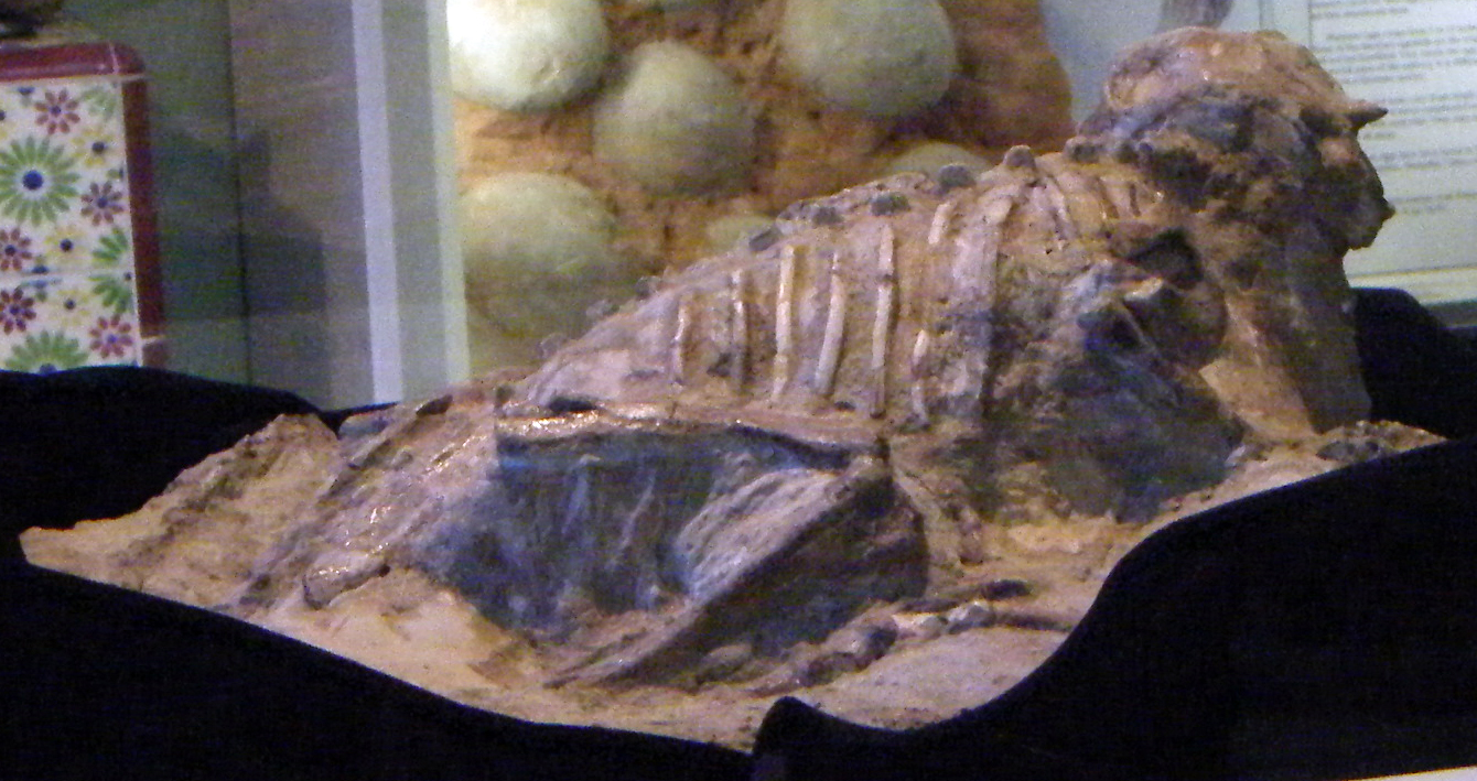 Psittacosaurus meileyingensis, Rice NW Museum (Set)